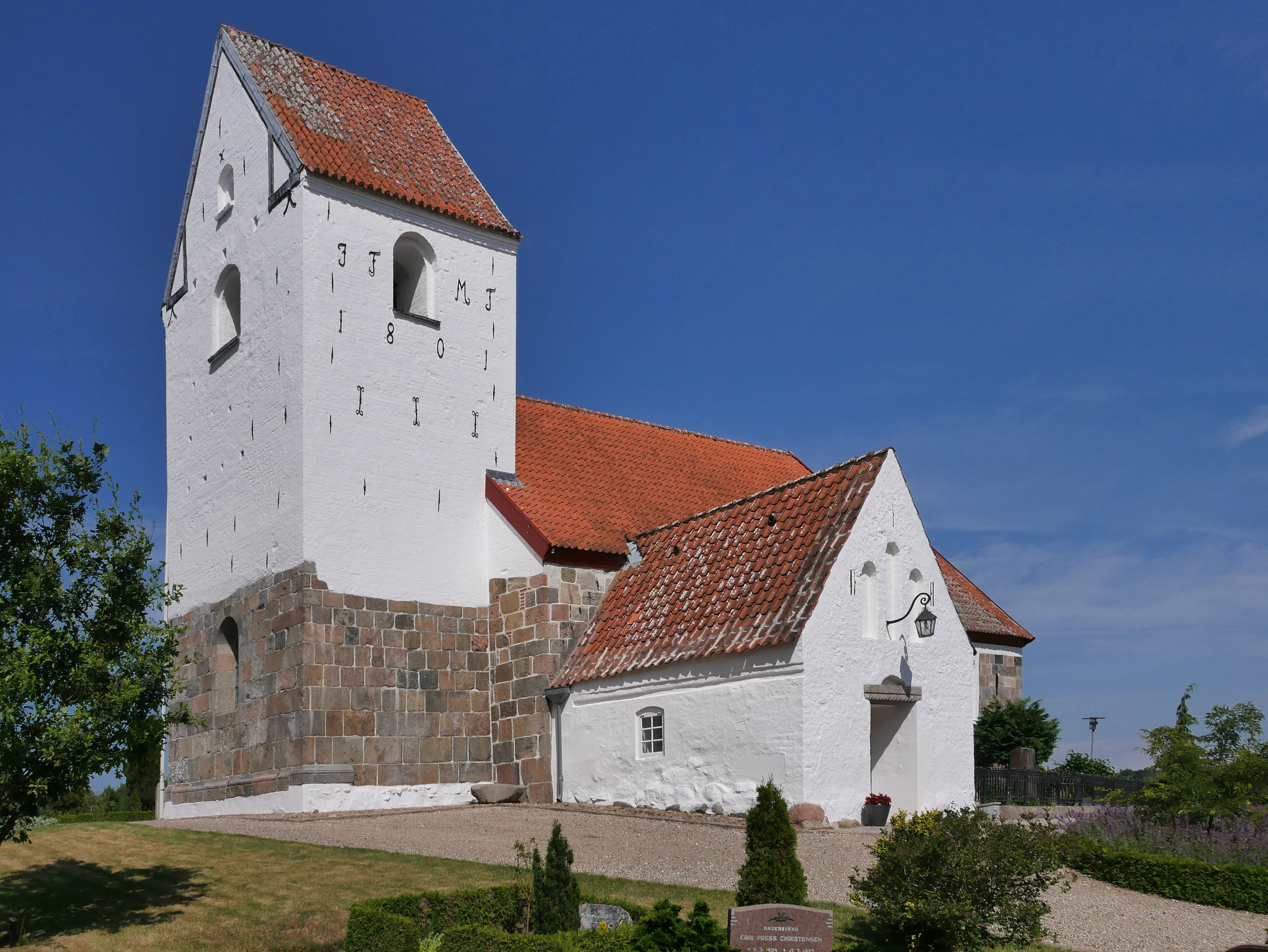 Kirche von Vive am Mariagerfjord (Dänemark, Nord-Jütland)- Erbaut etwa 1250, schöne Innenausstattung: romanischer Taufstein, Renaissacealter, Kanzel aus dem Historismus, moderne Orgel Ansicht von Südwesten